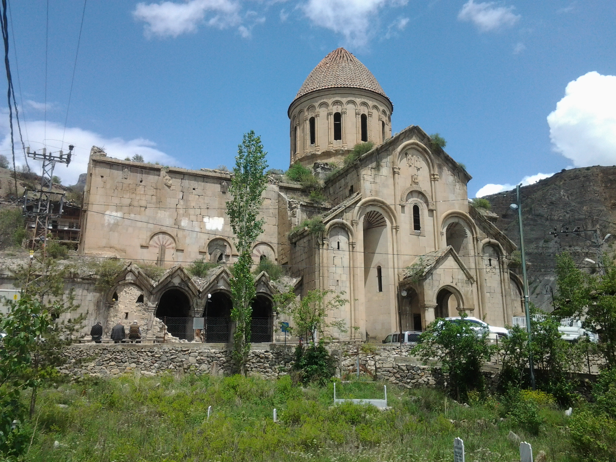 Georgische Deesiskerk in Osk Vank